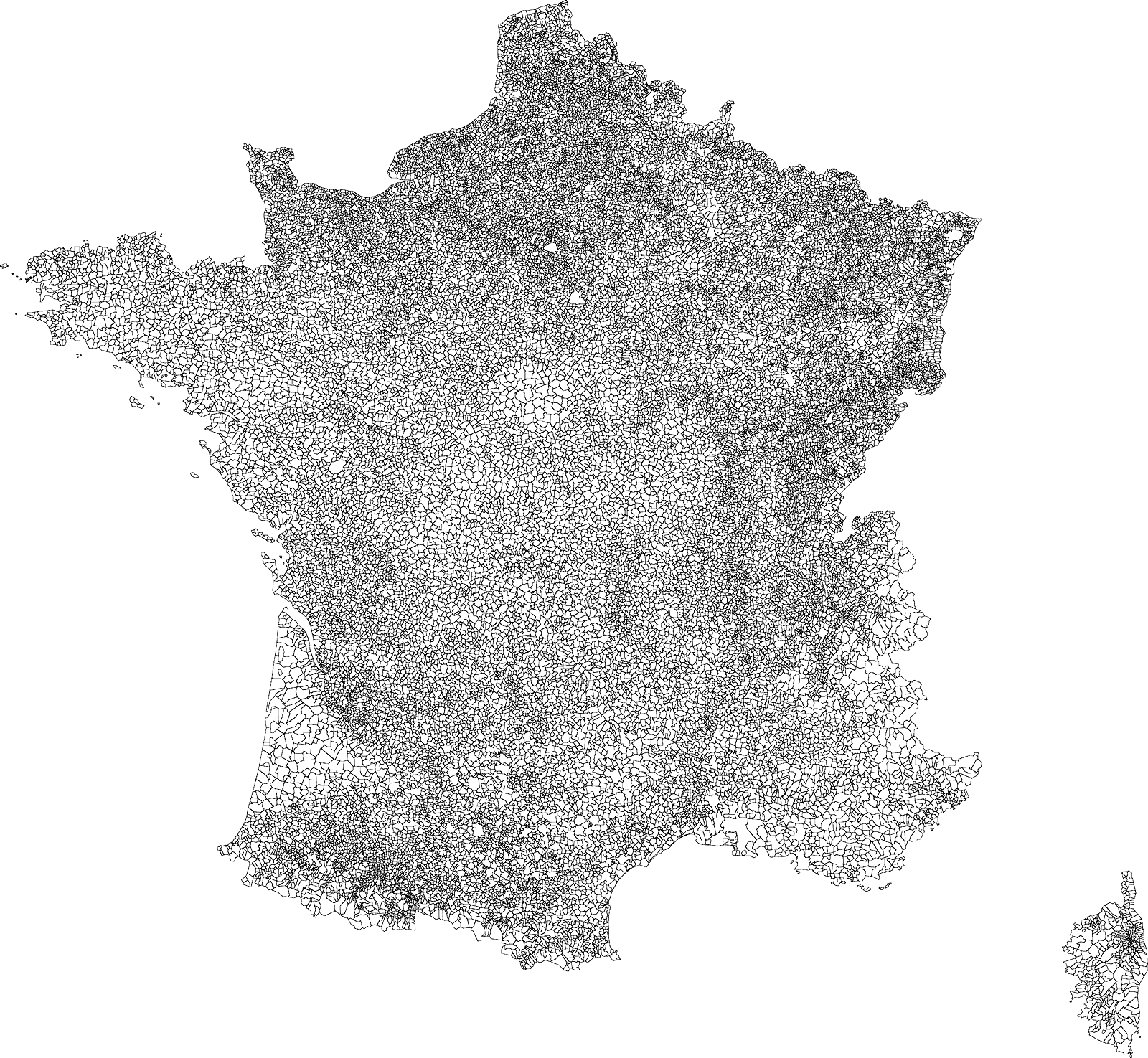 Communes de France métropolitaine, carte de l'auteur.